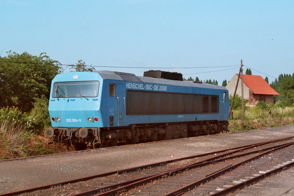 Diesellokomotive der Baureihe 202 der Hersfelder Eisenbahn im Mieteinsatz bei der Hersfelder Eisenbahn in Ransbach.